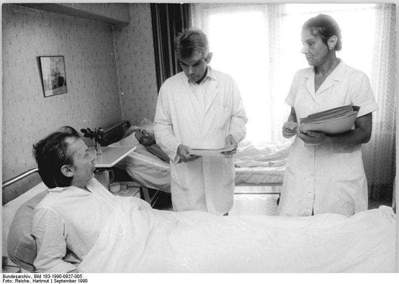 Berlin-Biesdorf, Krankenhaus, Arztvisite ADN-Hartmut Reiche 27.9.90 Berlin: Alkoholiker- Oberarzt Dr. Kesten und Schwester Erika machen Visite in der Aufnahmestation für Alkoholkranke im "Wilhelm-Griesinger"-Krankenhaus in Biesdorf. Hier werden Männer und Frauen aufgenommen, die im Delirium zusammengebrochen sind. 30 Betten stehen zur Verfügung. Der akuten Krisenbewältigung folgen ca. drei Wochen Bewegungs- und Arbeitstherapie sowie Gespräche in der Gruppe. Berlin-Biesdorf, hospital, doctor visit ADN-Hartmut Reiche 27.9.90 Berlin: Senior Physician of alcoholism Kesten and Sister Erika visit the reception center for alcoholics in the "Wilhelm Griesinger" hospital in Biesdorf. Men and women who have collapsed in delirium are admitted here. 30 beds are available. The acute crisis management is followed by three weeks of exercise and work therapy as well as group discussions.